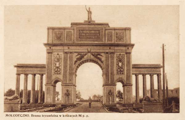 Беларуская (тарашкевіца): Маладэчна (Maładečna), Гелянова (Hielanova). Трыюмфальная брама